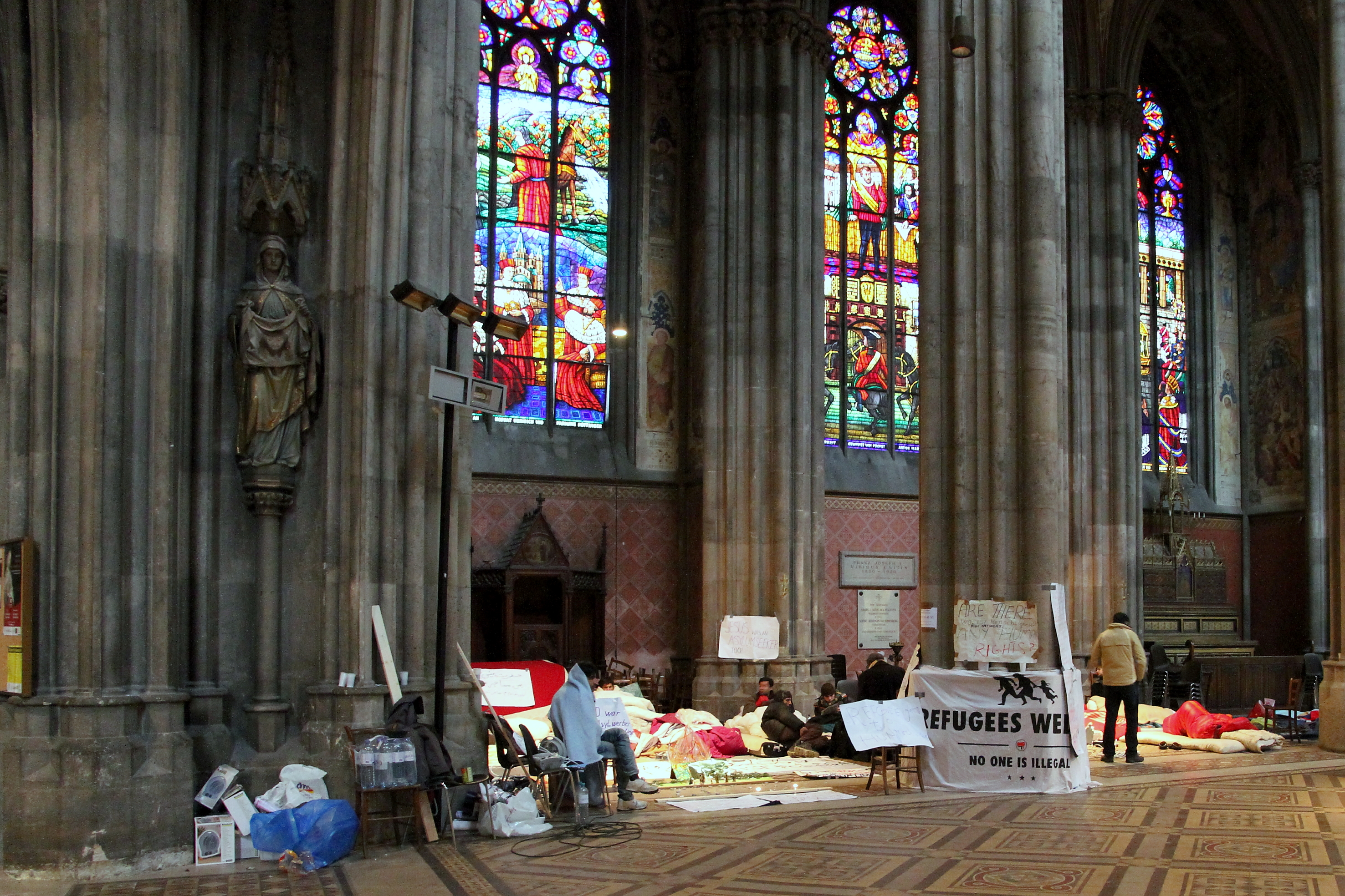 Besetzung der Wiener Votivkirche durch Flüchtlinge (Asylwerber) und Antifa-Aktivisten im Dezember 2012.